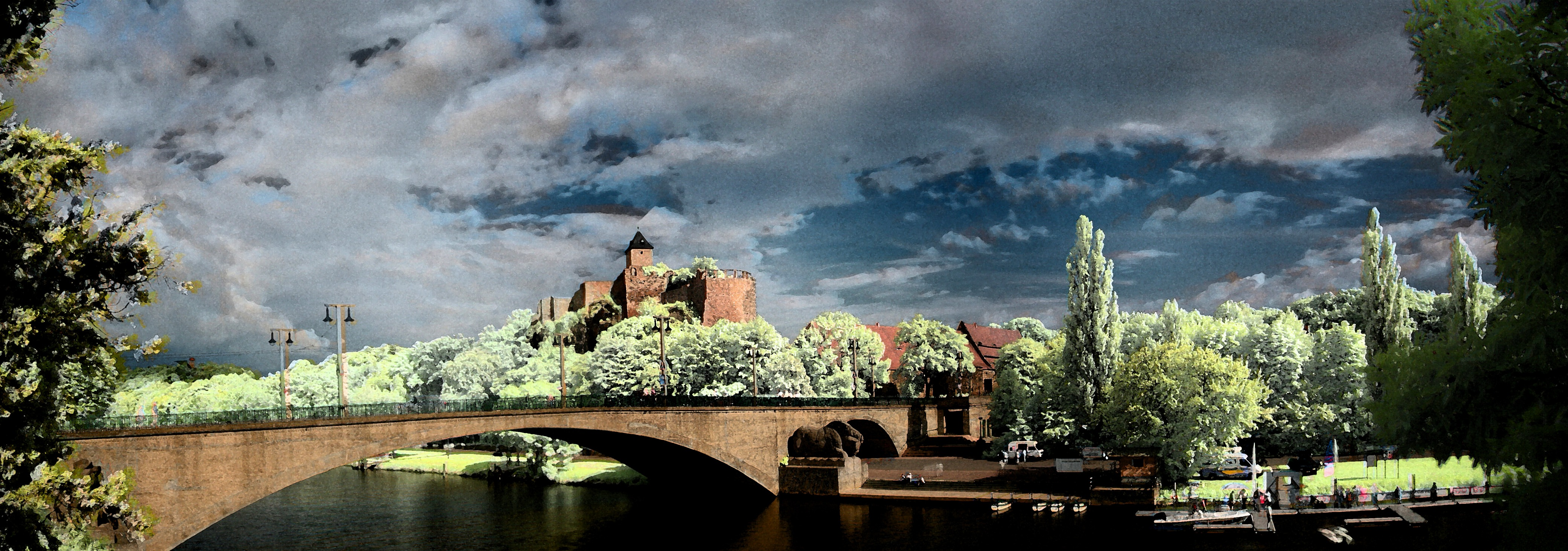 Burgpanorama